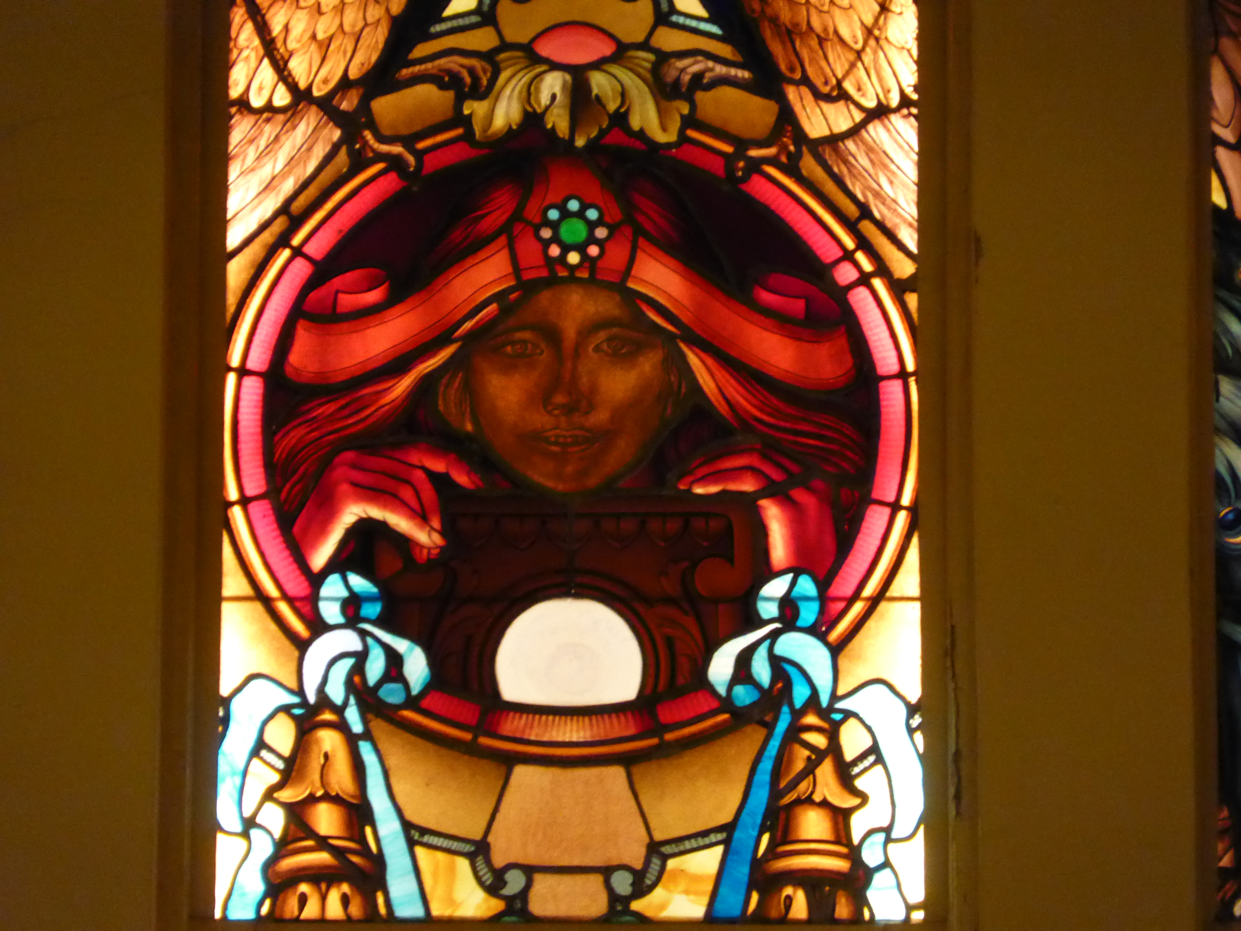 Cine Ideal (Madrid, España), calle Doctor Cortezo. Detalle de las vidrieras de la fachada principal, encima de las puertas de entrada y la cartelera. Este cine se inauguró en 1916. Las vidrieras se atribuyen a los talleres españoles de la Casa Maumejean.